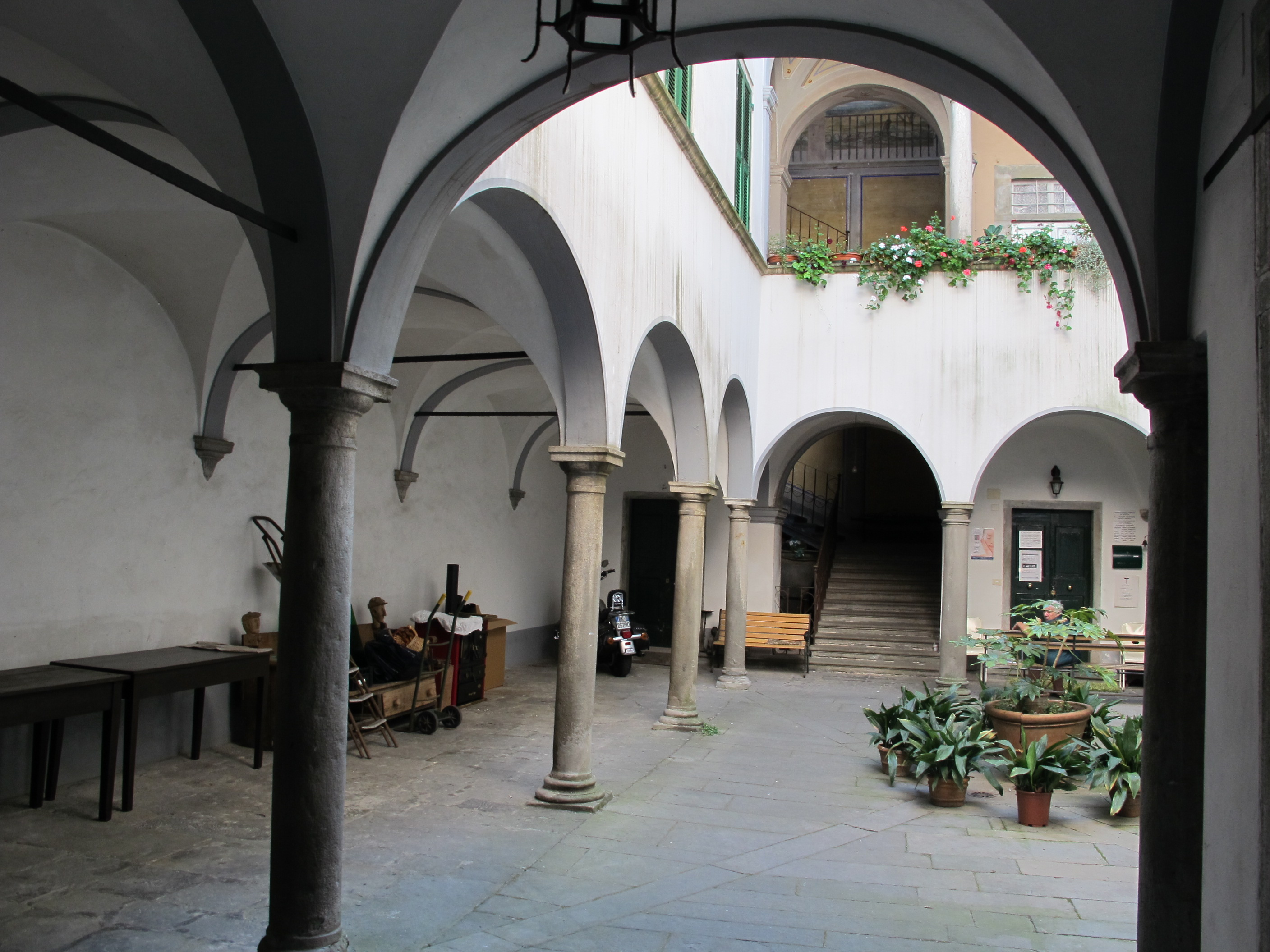 Pontremoli, via cavour, cortile